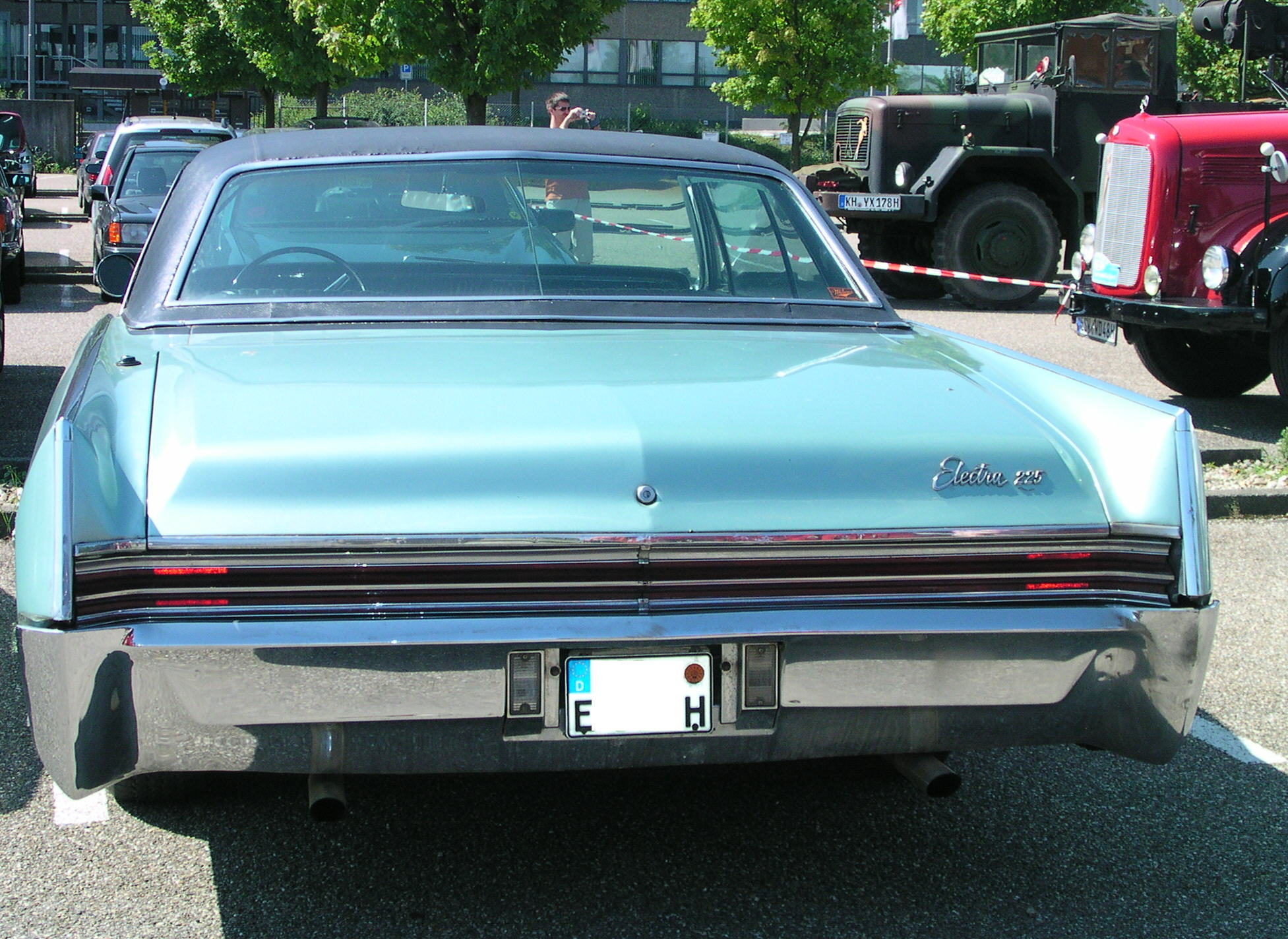 Buick Electra 225 Coupé von 1966 in Wörth am Rhein beim Oldtimer-Treffen bei Daimler-Chrysler